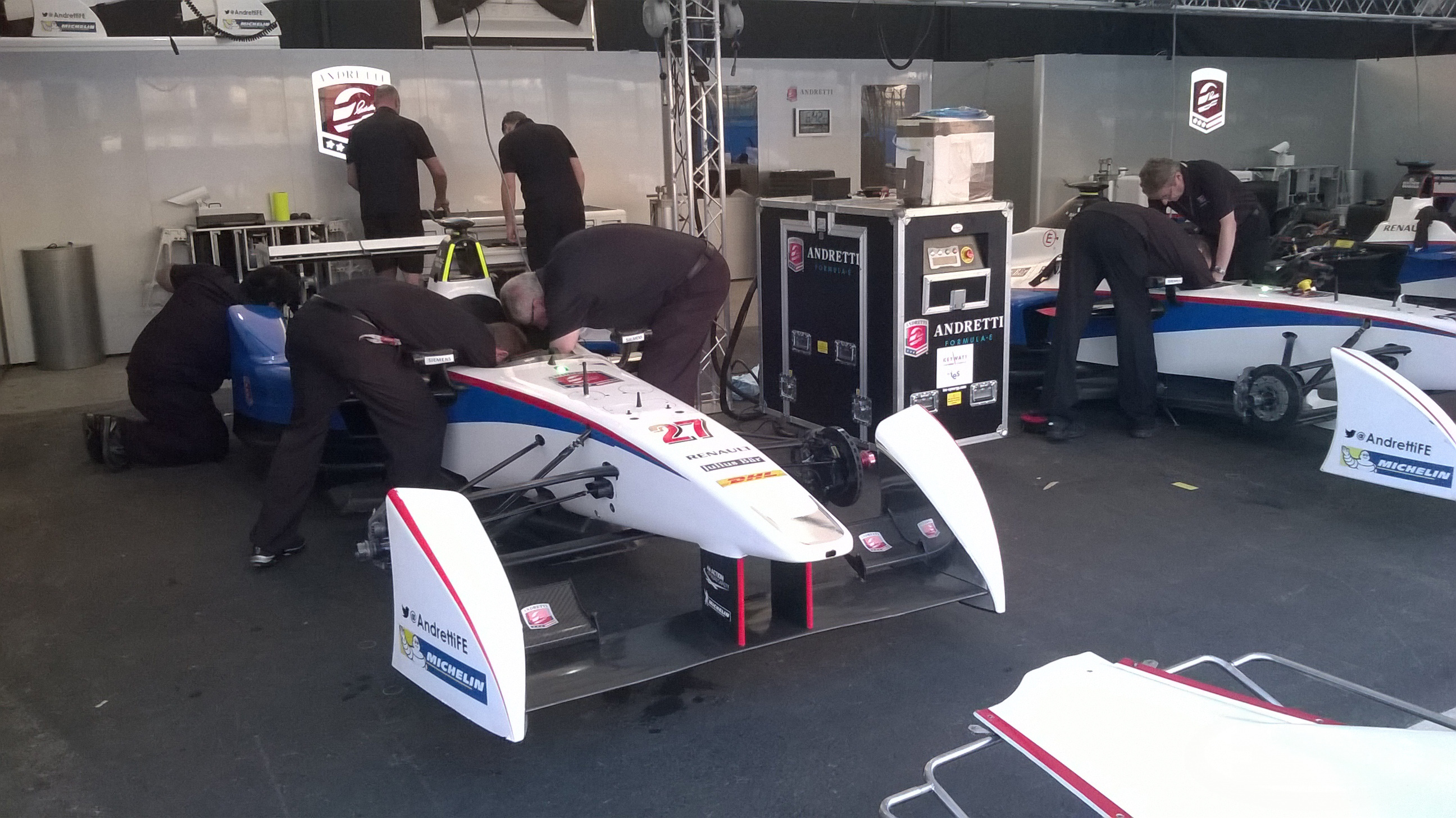 Solo se permite el uso de esta imagen mencionando a Velocidad Total como su autor. Imagen del equipo Andretti de Fórmula E, durante el Punta del Este ePrix de 2014.